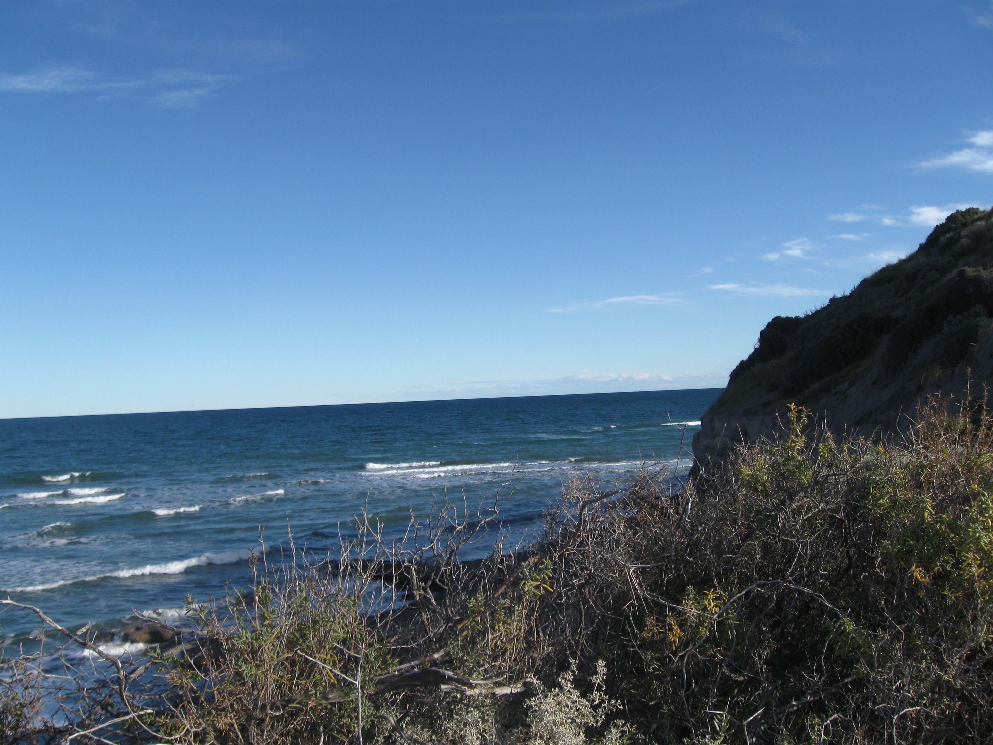 Pozo Salado,zona de acantilados,durante pleamar.